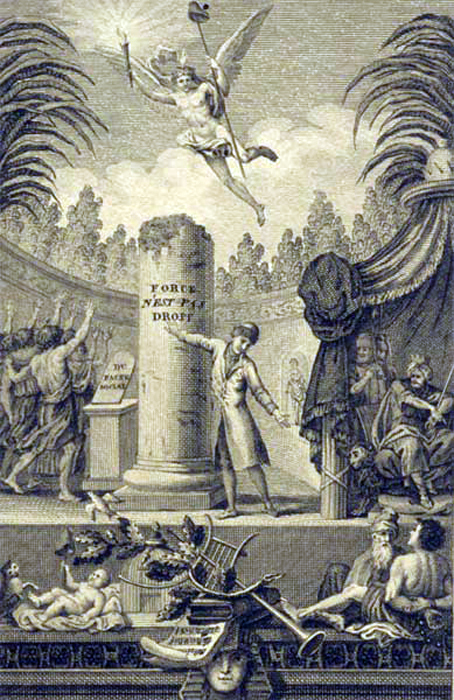 Gravure sur cuivre. Illustration du Contrat social pour l'édition Didot-Bozarian.